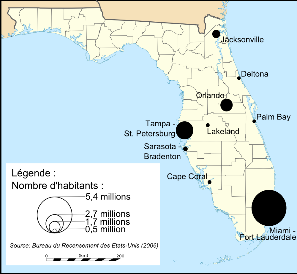 Carte des principales agglomérations de Floride en 2006. Source : U.S. Census Bureau